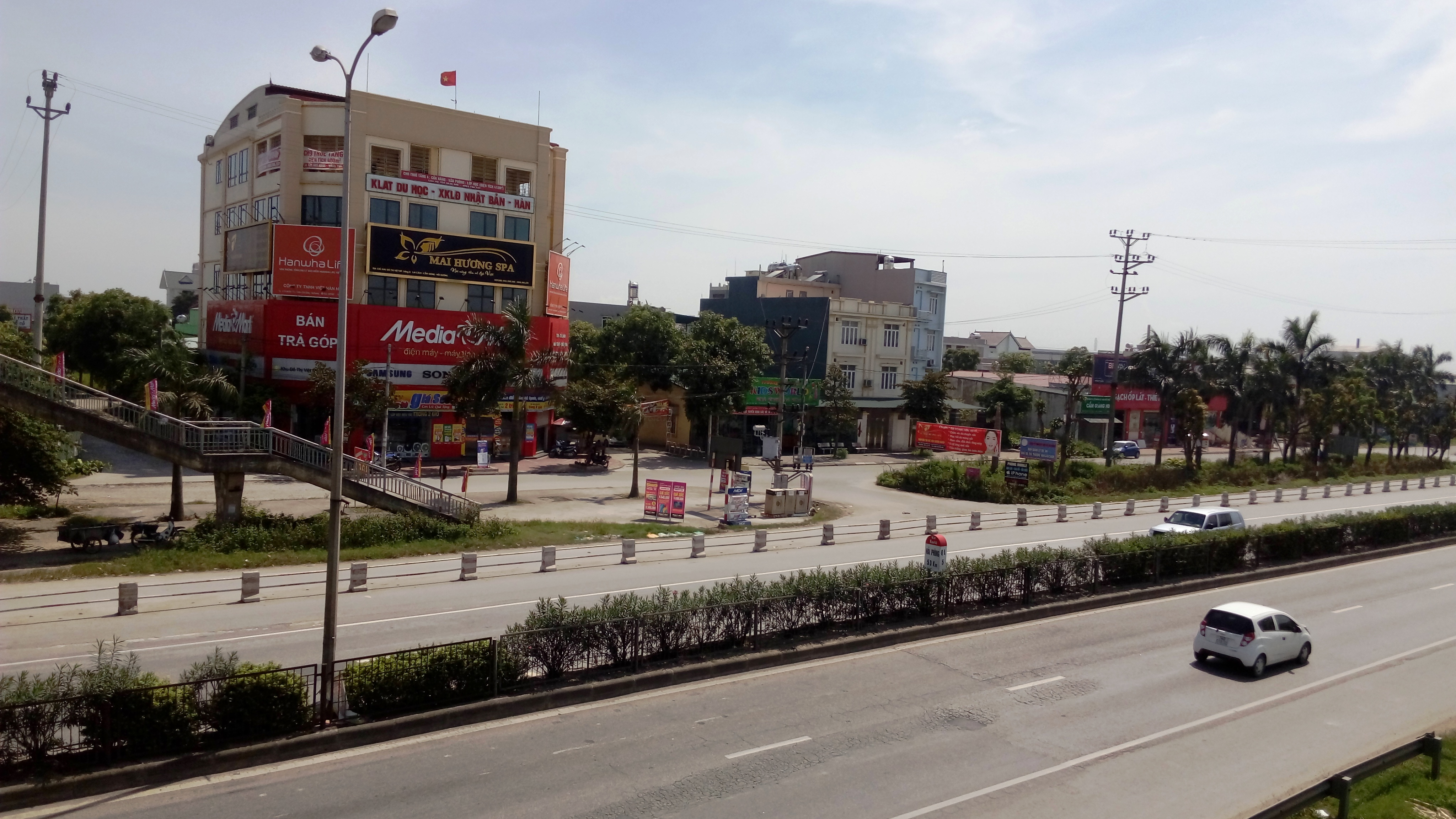 Thị trấn Lai Cách nhìn từ phía cầu vượt quốc lộ 5A